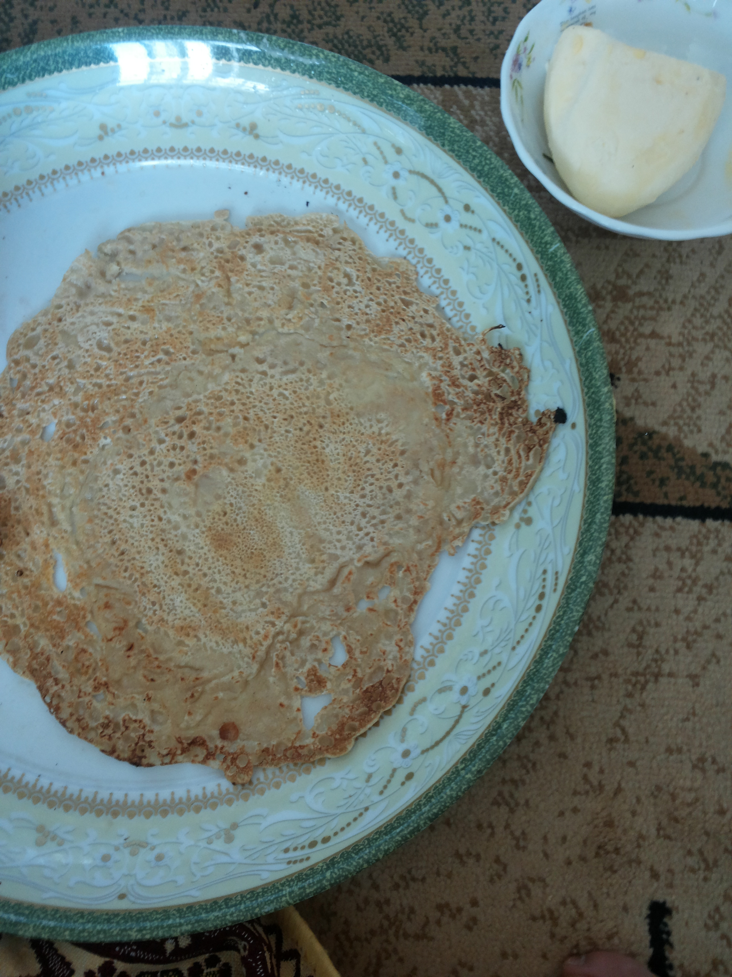 کوردیی ناوەندی: شلکێنەی ناوتاوەیی. شلکێنە خواردەمەنییەکی کوردییە.